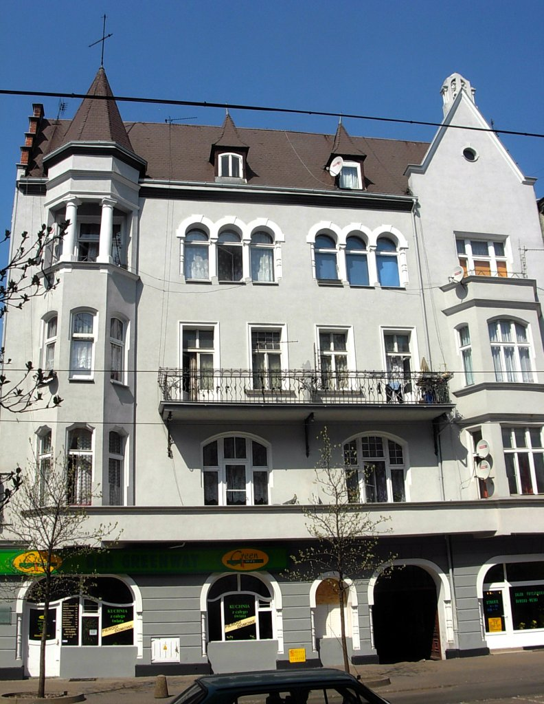 Kamienica ul. Gdańska 79 w Bydgoszczy